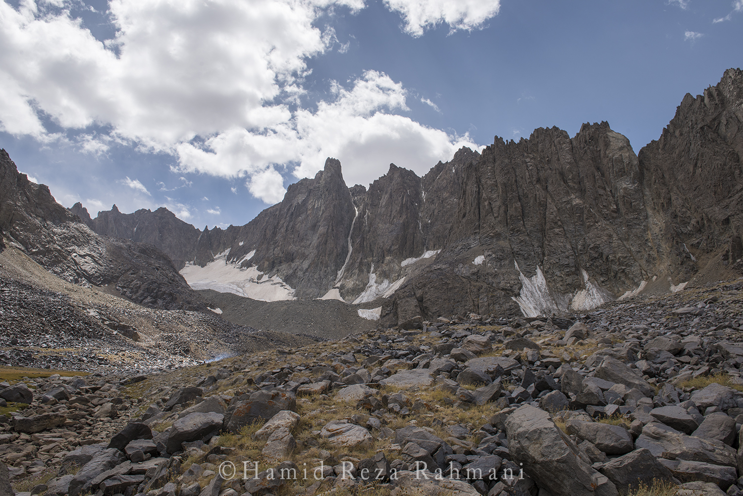 kohi-baba